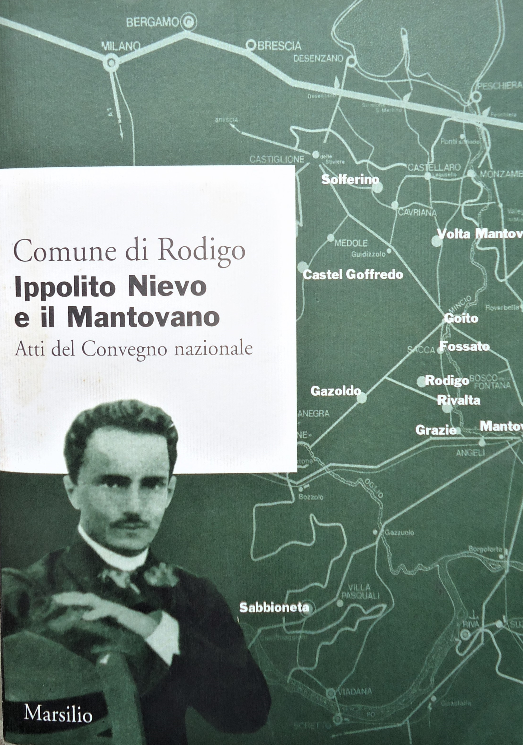 Atti del Convegno nazionale-Rodigo 7-9 ottobre 1999. Testi di: Pier Vincenzo Mengaldo, Cesare De Michelis, Stanislao Nievo, Fausta Samaritani, Maurizio Bertolotti, Enrico Testa, Paolo Ruffilli, Franco Della Paruta e altri. Copertina con foto d'Ippolito Nievo, febbraio 1859-1860.